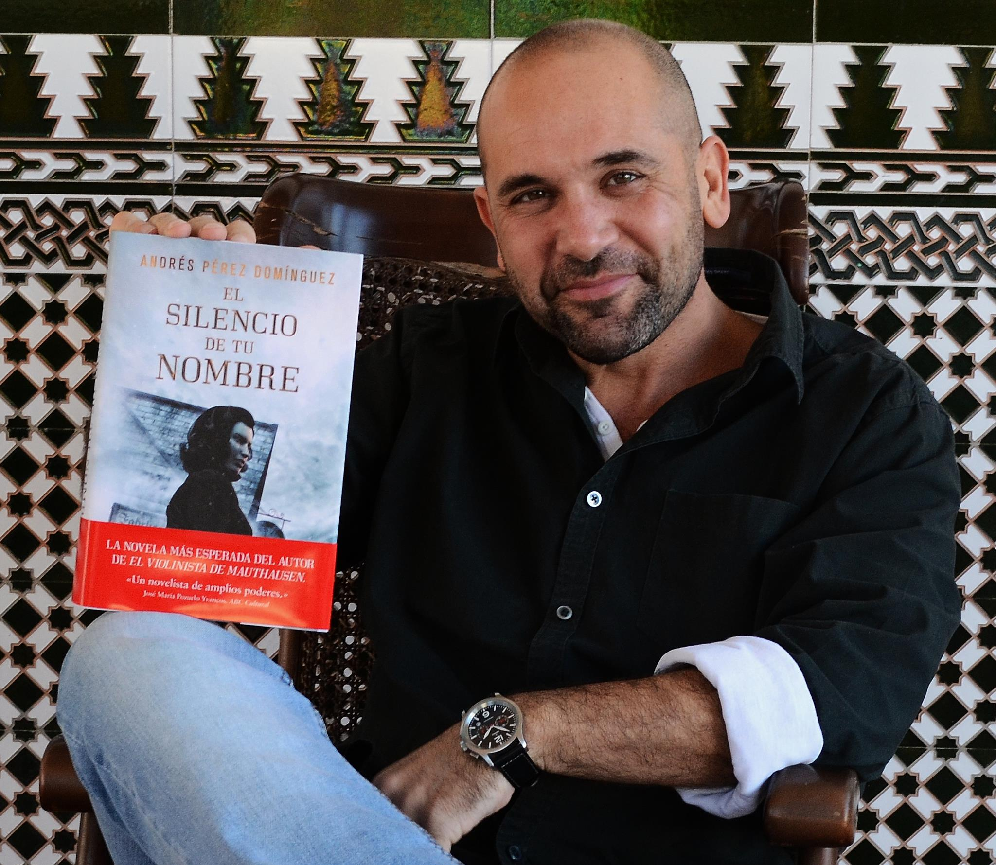 El escritor español Andrés Pérez Domínguez